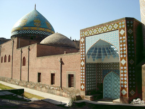 Mosquée bleue d'Erevan 6/150